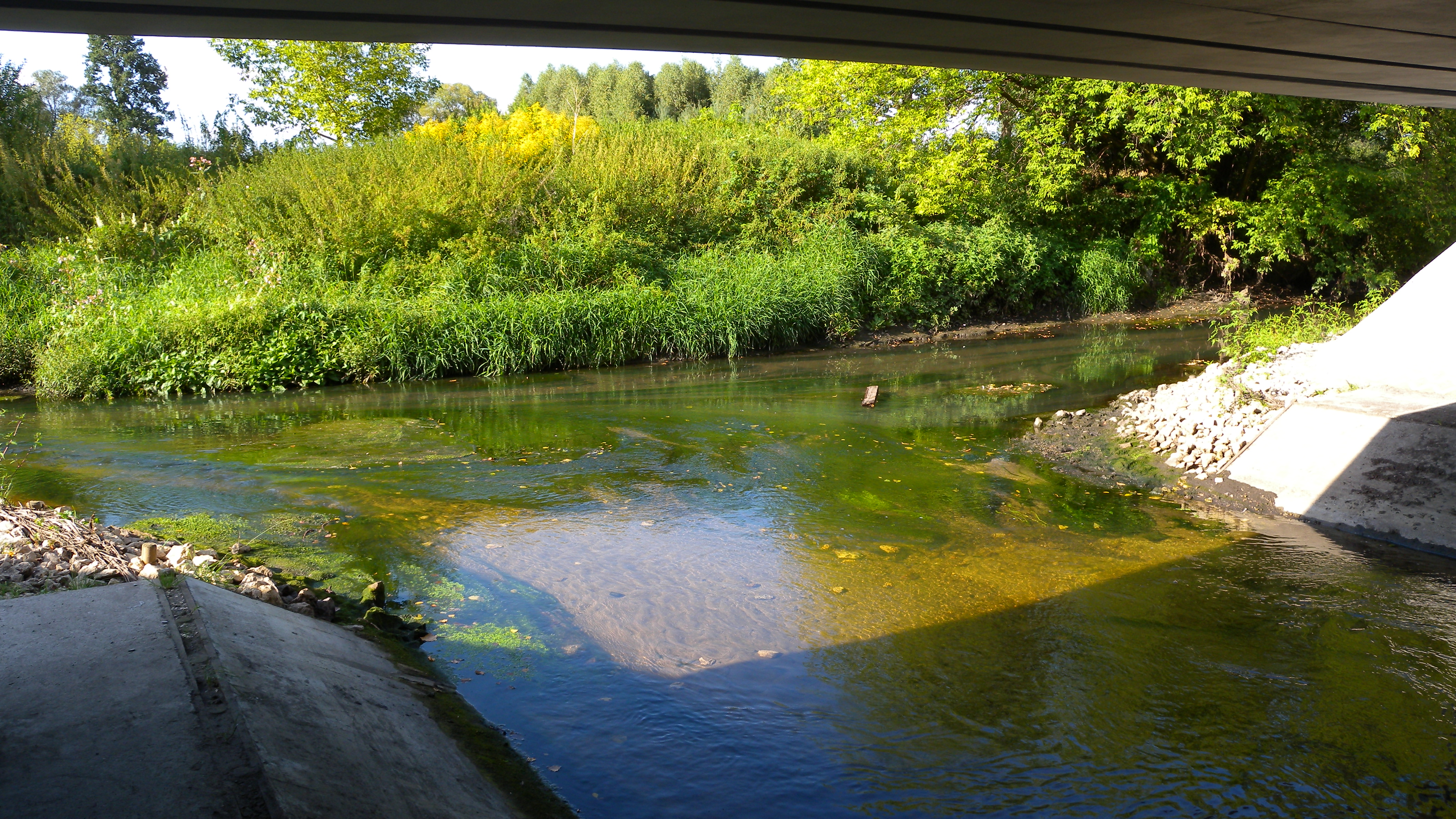 Łódź Łaskowice - Dobrzynka wpływa do Neru